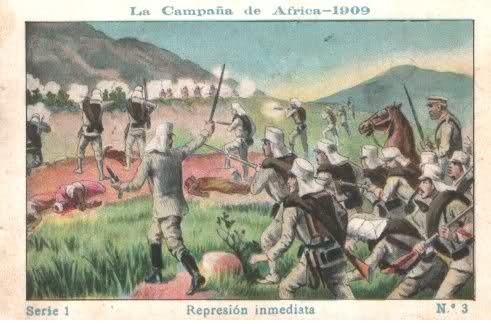 Apenas sabedor el general Marina del desmán de los riffeños, salió de Melilla con una columna de infantería, artillería, ingenieros y caballería para castigarlos debidamente. La columna encontró a las fuerzas enemigas sobre las alturas. A consecuencia de los obstáculos del terreno, los enemigos dominaban el flanco derecho y el camino. Cañoneó la posición, y la infantería, tras porfiado combate a la bayoneta, le desalojó de tres alturas hasta coronar las estribaciones del Yebel-Sidi-Ametilach que quedó conquistado.